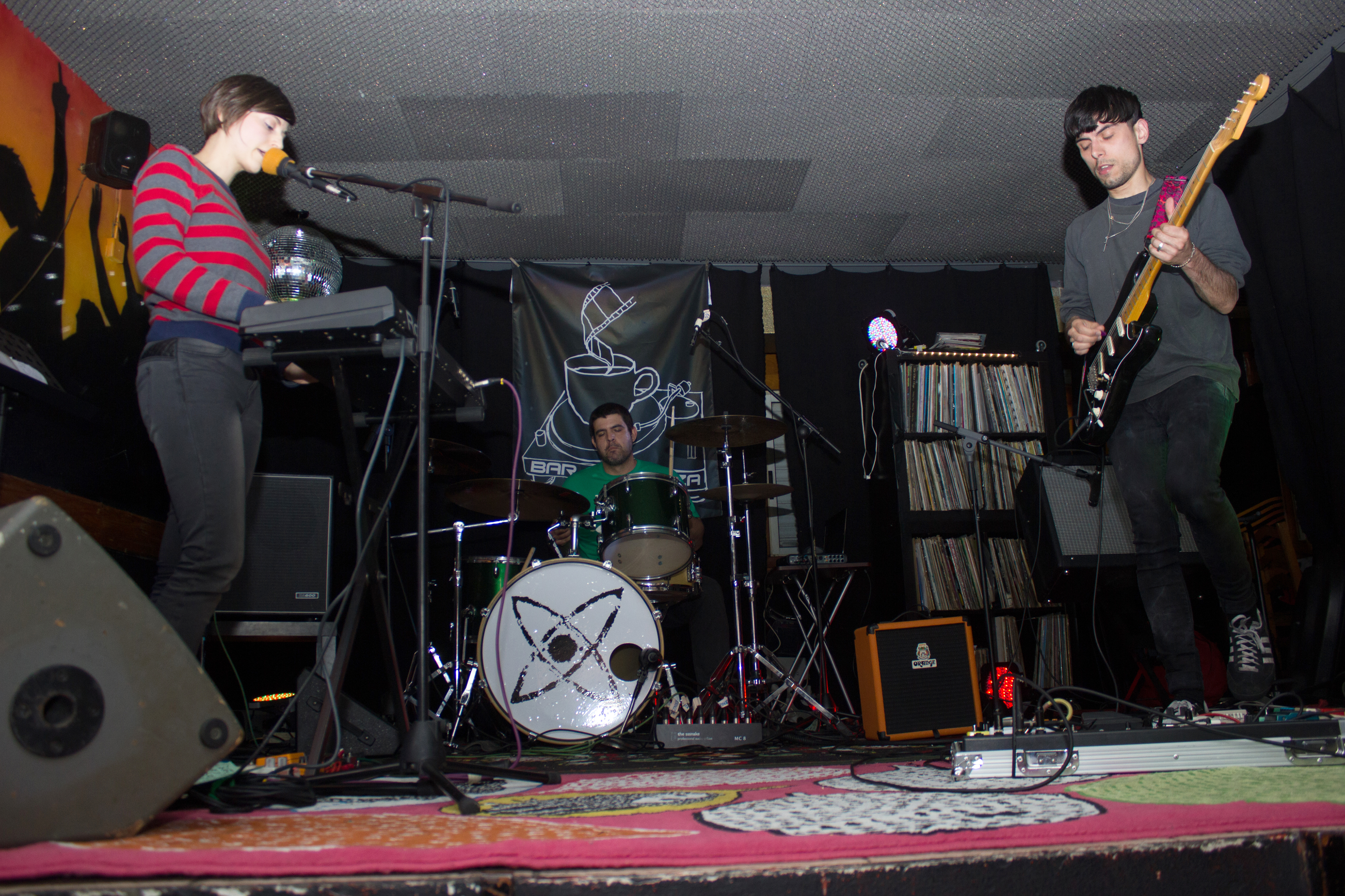 A banda galega Linda Guilala tocando no bar Labranza de Bueu en abril de 2014.